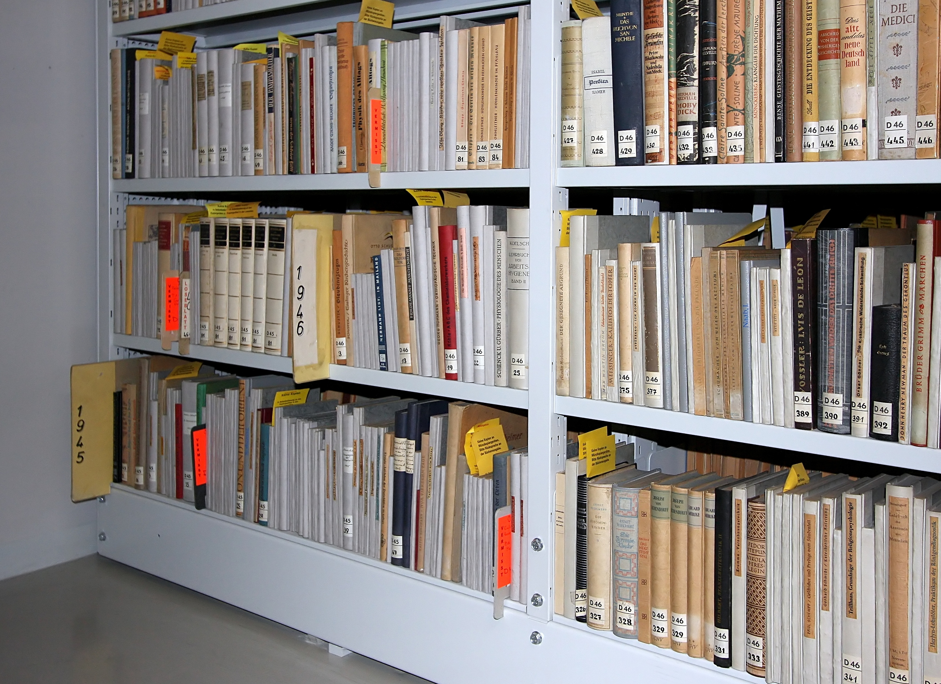 Deutsche Nationalbibliothek Frankfurt am Main: Magazin - Beginn der Sammlung 1945